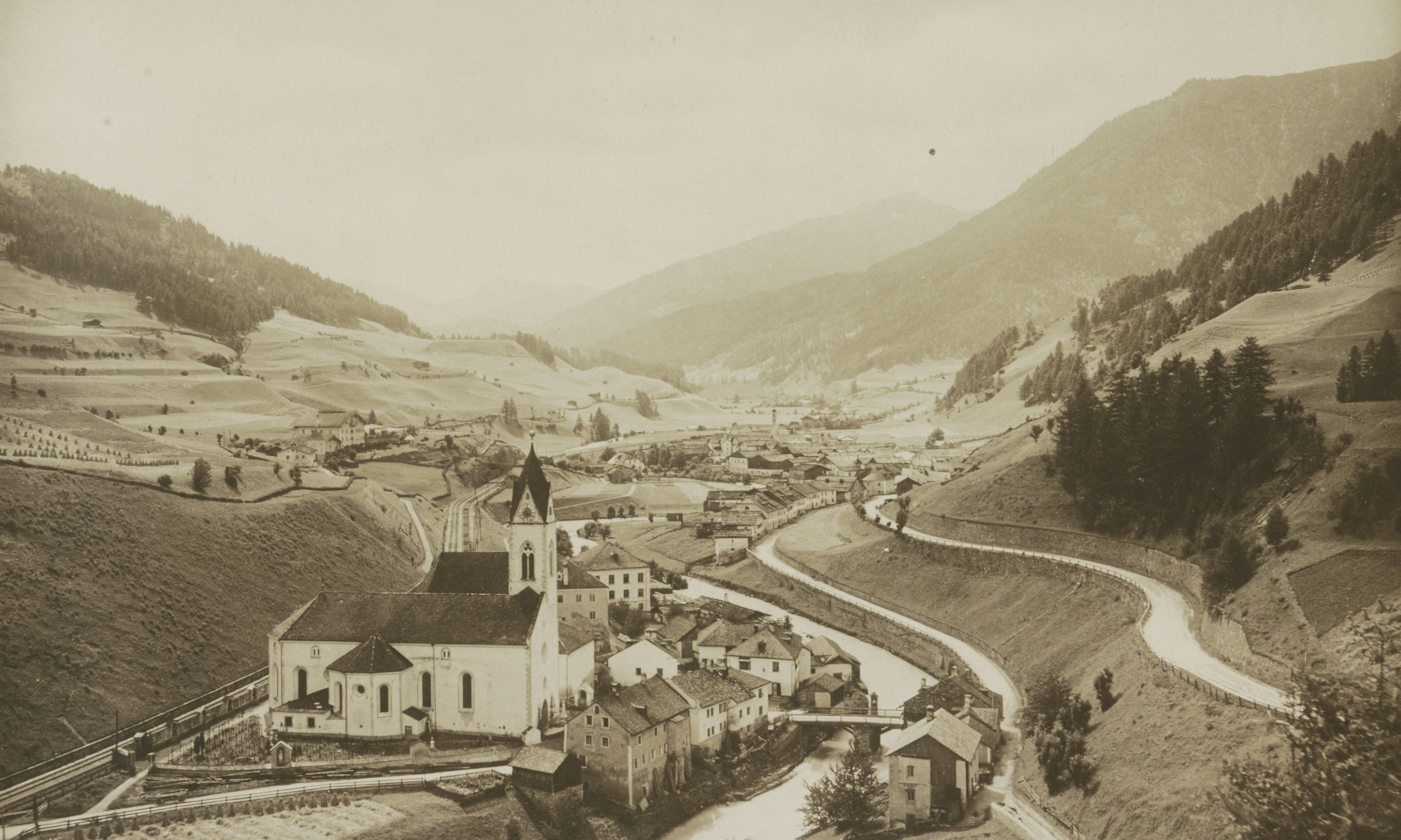 IdentificatieTitel(s): Gezicht op MatreiMatrei (titel op object)Objecttype: foto prentbriefkaart Objectnummer: RP-F-F00945-6Opschriften / Merken: opschrift, recto: ‘Photographicum’naam, verso, gedrukt: ‘Gebroeders Dobbelmann, Zeepfabrikanten, Nijmegen.’Omschrijving: Foto hoort bij een serie van 28 losse prentbriefkaarten van Engeland, Noorwegen, Italië, Duitsland en Tirol (foto's RP-F-F00945-1 t/m RP-F-F00945-28).VervaardigingVervaardiger: fotograaf: anoniemuitgever: Photoglob (vermeld op object)Plaats vervaardiging: TirolDatering: ca. 1870 - in of voor 1898Fysieke kenmerken: ontwikkelgelatinezilverdrukMateriaal: fotopapier Techniek: ontwikkelgelatinezilverdrukAfmetingen: kaart: h 98 mm × b 145 mmToelichtingOnduidelijk is Waar: deze foto gemaakt is. Er bestaan nl. twee plaatsen met deze naam: Matrei am Brenner en Matrei in Osttirol.OnderwerpWat: travelling; tourismprospect of village, silhouette of villageparts of church exterior and annexes: towerWaarTirolVerwerving en rechtenVerwerving: overdracht van beheer 1994Copyright: Publiek domein